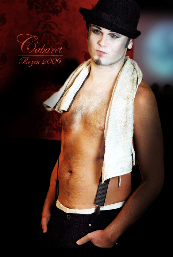 Tomas Tomke als Conférencier beim Musical CABARET / Vereinigte Bühne Bozen